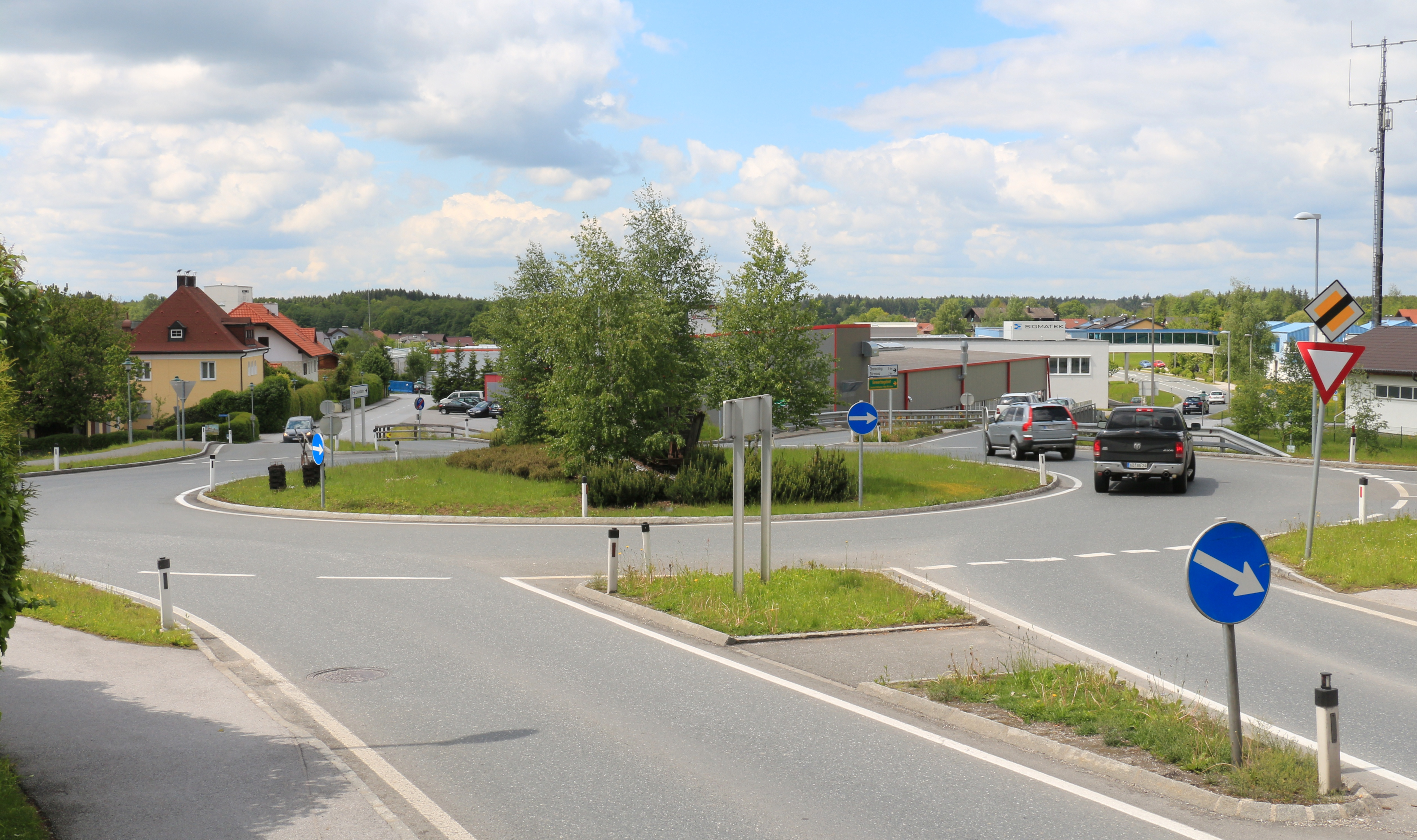 Kreisverkehr Lamprechtshausen, Land Salzburg, an der Lamprechtshausener Straße (B156) mit Beginn der Bürmooser Landesstraße (L115) im Hintergrund rechts.